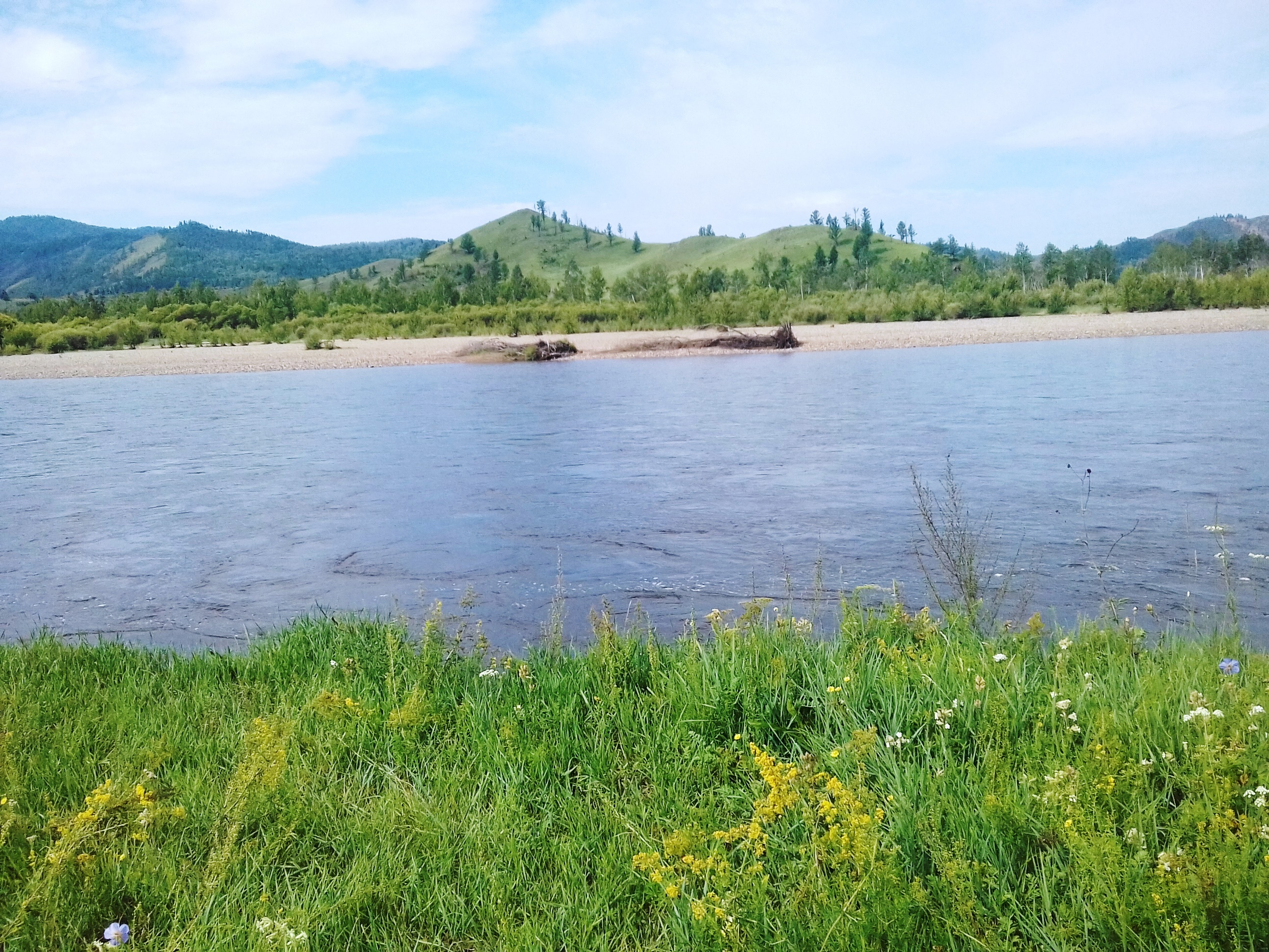 The bank of the river Dzhida. Dzhidinsky district of Buryatia, Russia